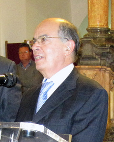 La noche previa a la inauguración del foro de FAMSI se celebró una recepción para los participantes en la Diputación de Córdoba, que fue presidida por el diputado de Cooperación, Antonio Sánchez Villaverde; por el alcalde de Rabat, Fathallah Oualaalou (en la imagen), y por el secretario general de FAMSI, Juan Ramón Troncoso